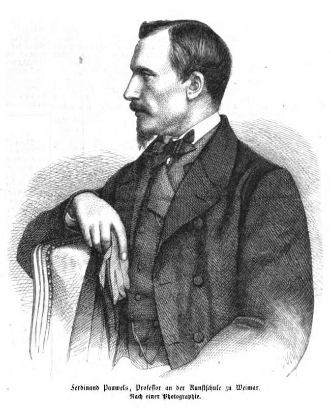 Ferdinand Pauwels, flämischer Maler, Professor an der Kunstschule zu Weimer, 1862